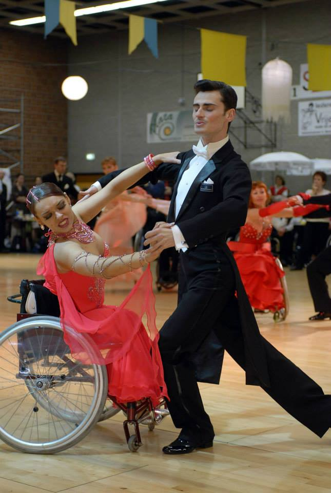 Украинский танцевальный дуэт Александр Иванов и Иллона Слуговина. Многократные Чемпионы мира и Европы по спортивным танцам на колясках. Мастера спорта международного класса. Спортклуб "Березиль", г.Киев, Украина.